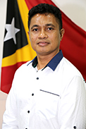 Mariano Sabino Lopes, Abgeordneter des Nationalparlaments Osttimors